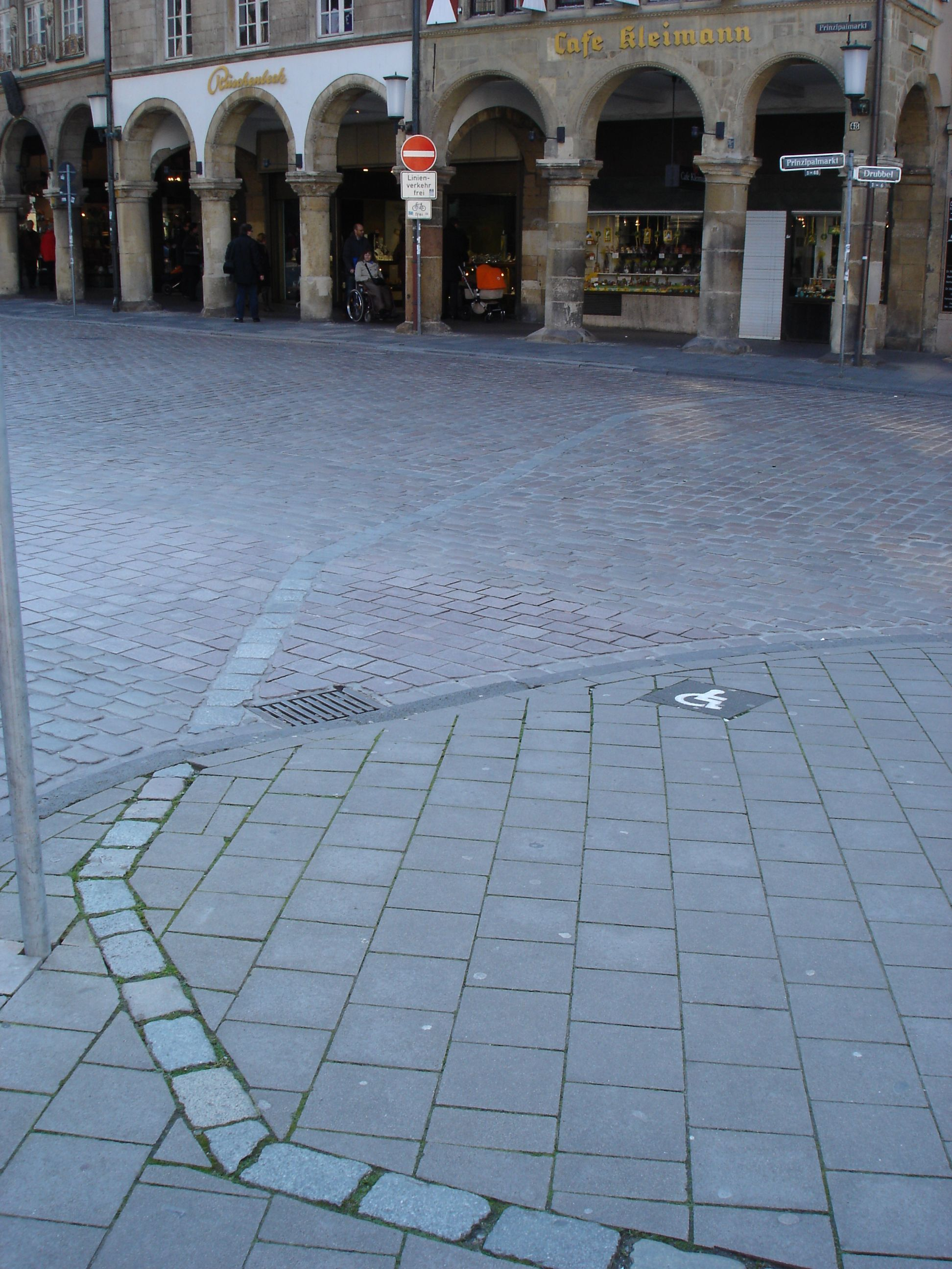 Markierung des ehemaligen Drubbels in Münster